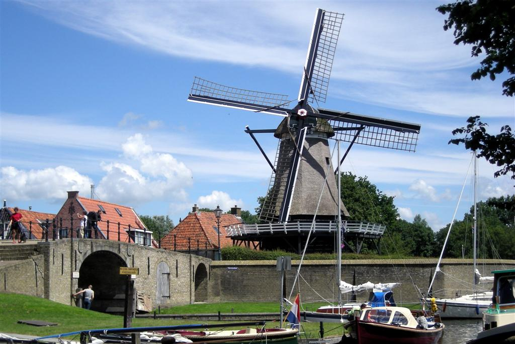 De Kaai, molen in Sloten